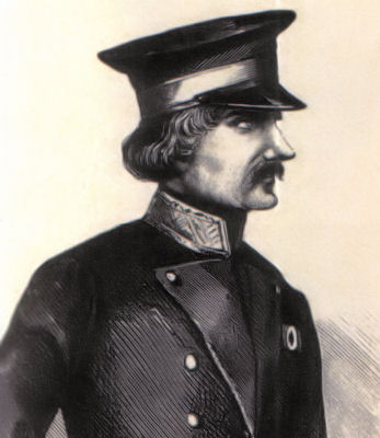 Wysocki Jozsef